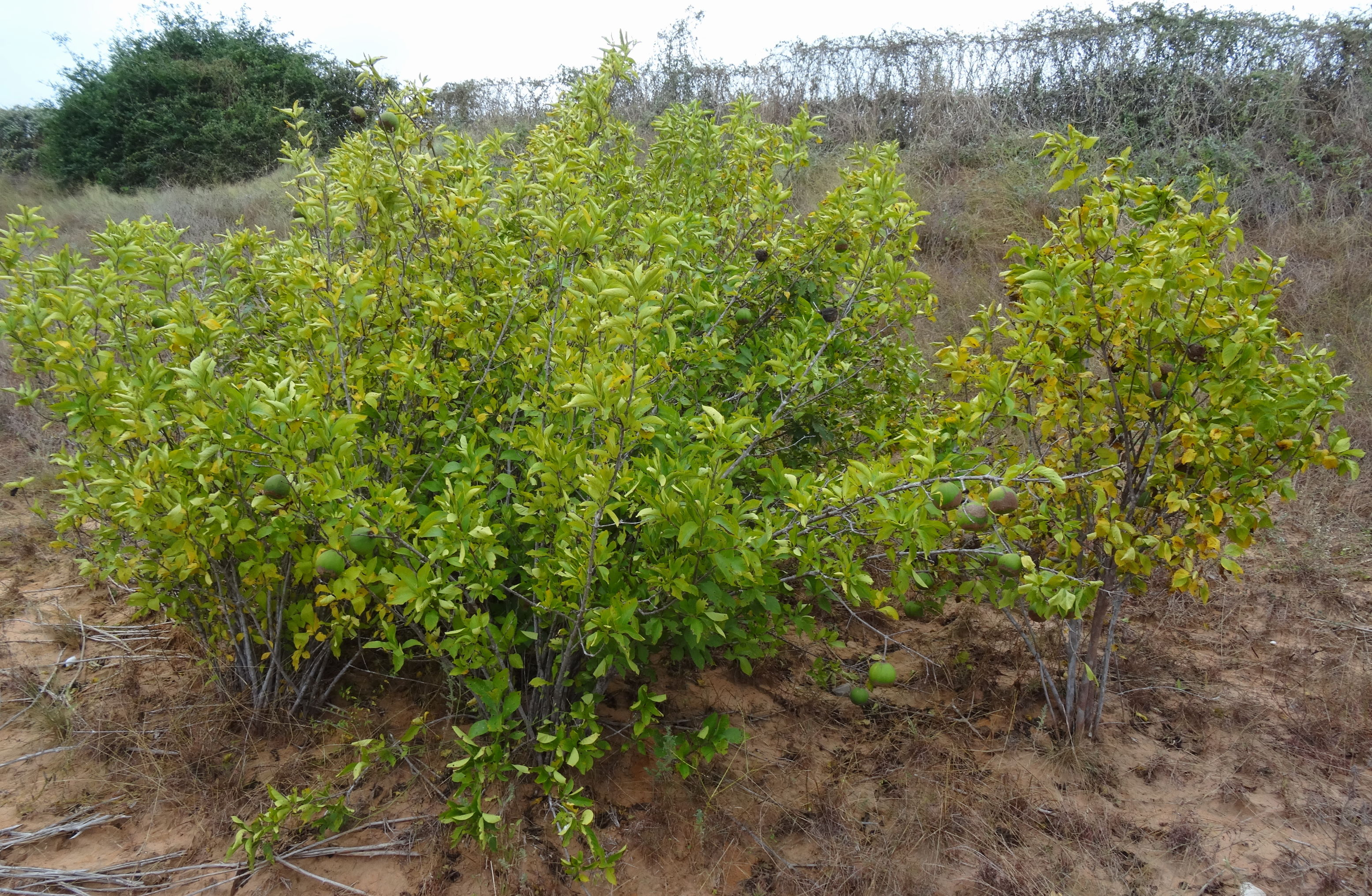 Phellocalyx vollesenii , Pemba, Mozambique. © Ton Rulkens View source Supplier: Flickr: EOL Images Photographer: Ton Rulkens Location Created: Pemba, Cabo Delgado, Mozambique View full-size image